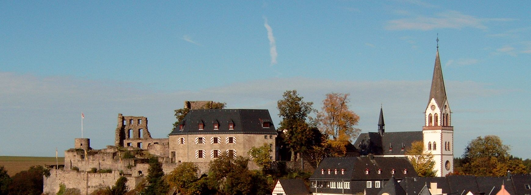 Kastellauner Burg und kath. Kirche Kastellaun